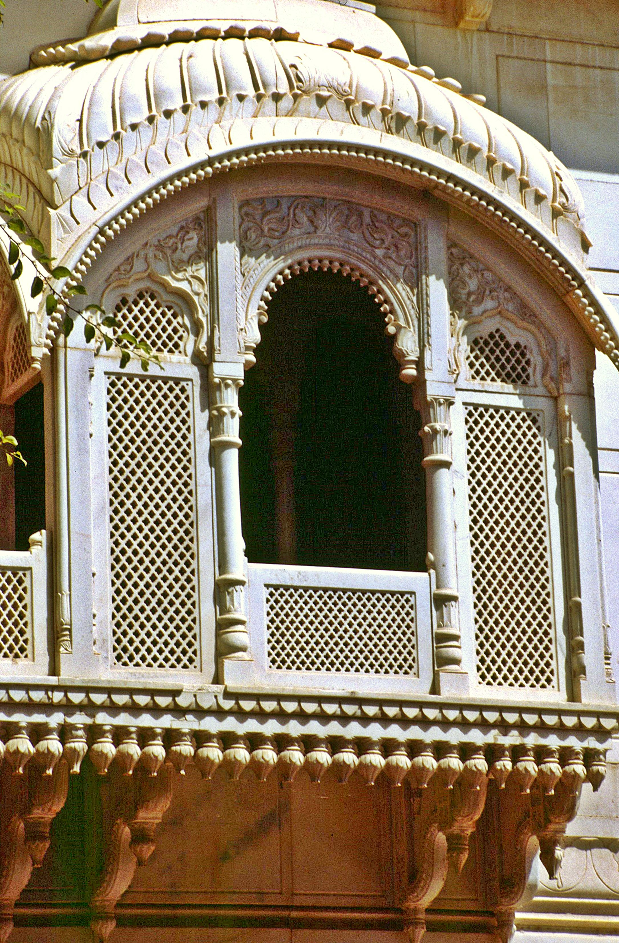 Sukkur: Erker am Sadhu-Bela-Heiligtum